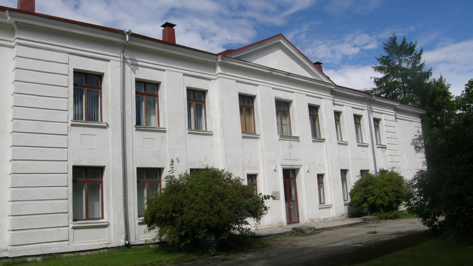 Loksa 1. Keskkool